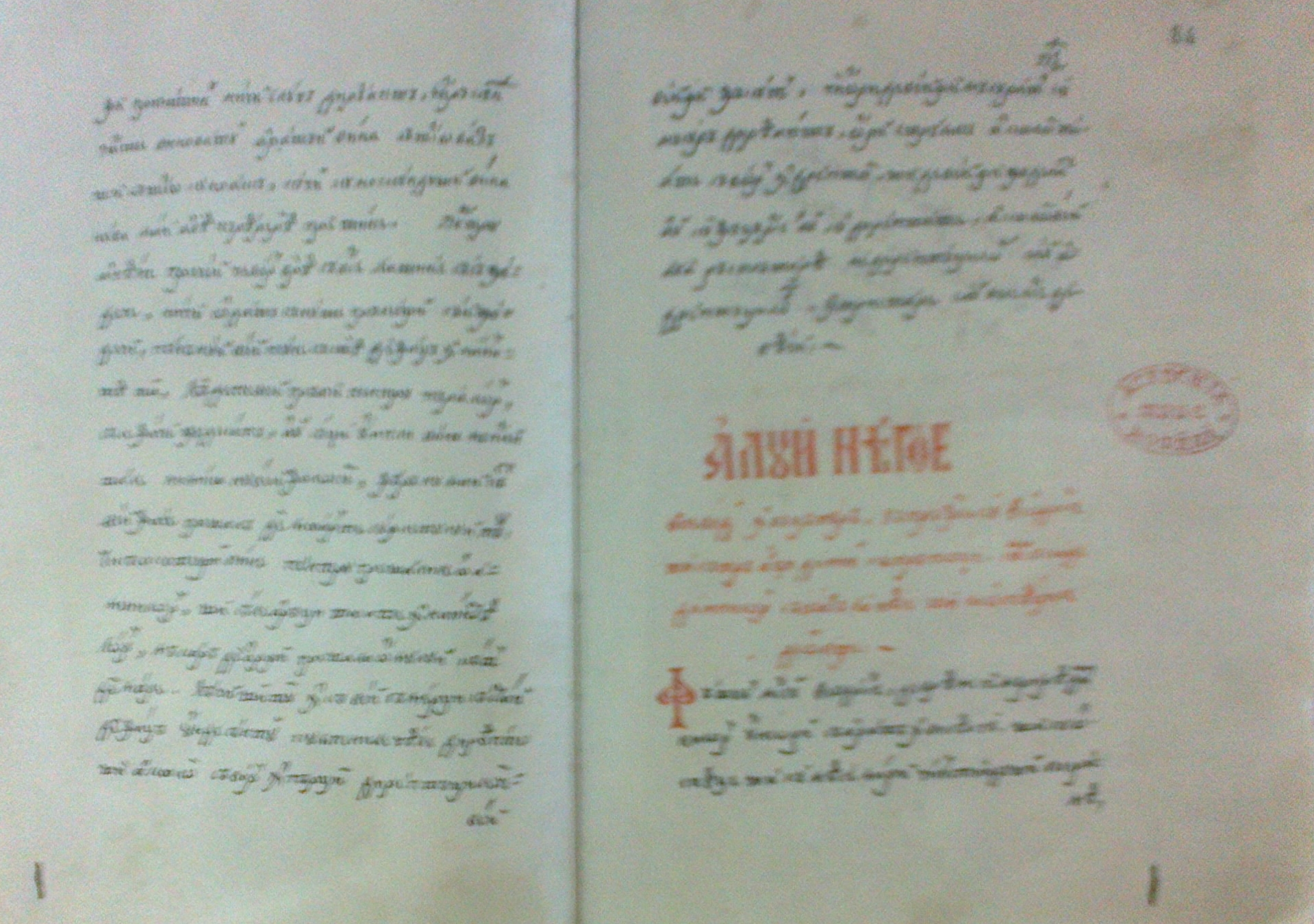 Imagine foto de joasă rezoluţie din "Învăţăturile lui Neagoe Basarab către fiul său Teodosie" existentă la Muzeul Tiparului din Ţara Românească din cadrul Complexului Muzeal Turnul Chindiei din Târgovişte.